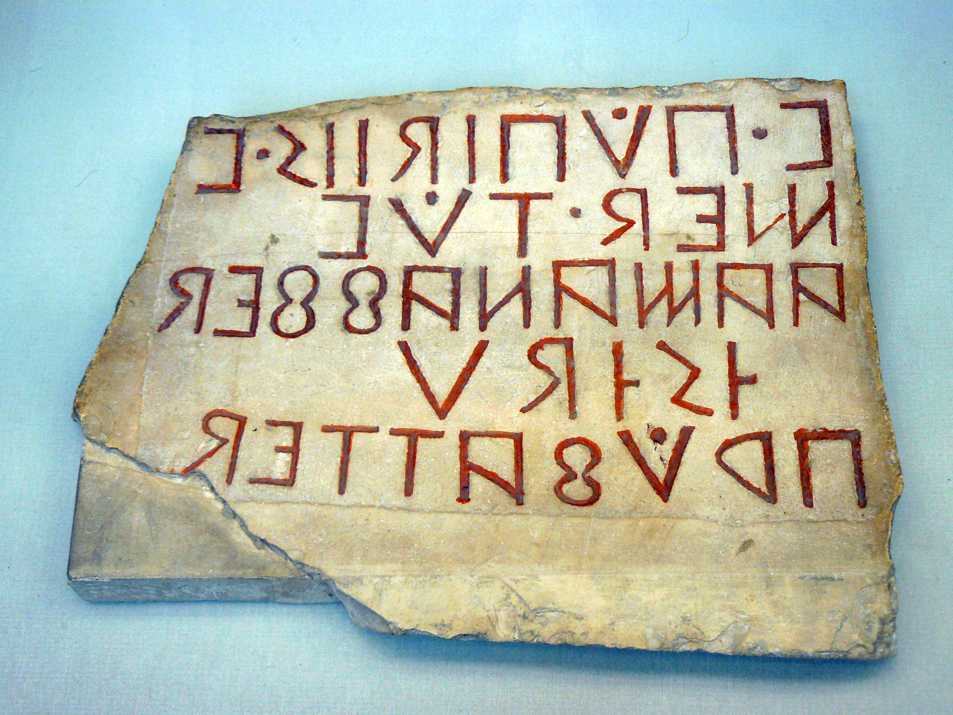 Stèle portant une inscription en osque (British Museum, Londres). Vers 300 - 100 avant J.C. Trouvée dans l'arche intérieure de la porte de Nola à Pompéi. Se lit de droite à gauche : "Vibius Popidius, fils de Vibius, magistrat principal, était responsable de cet ouvrage et l'a approuvé".